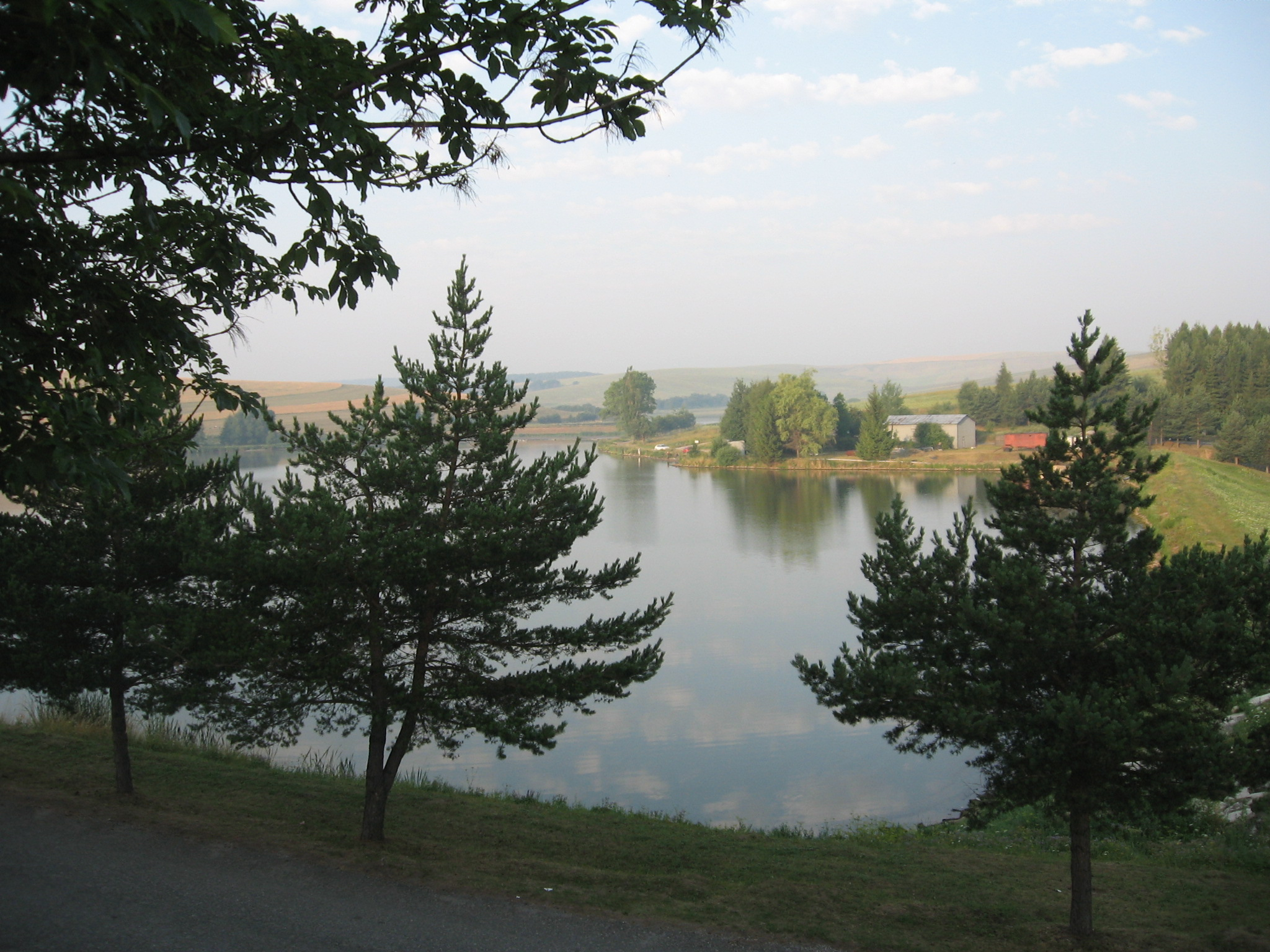 termálne kúpalisko s celoročnou prevádzkou